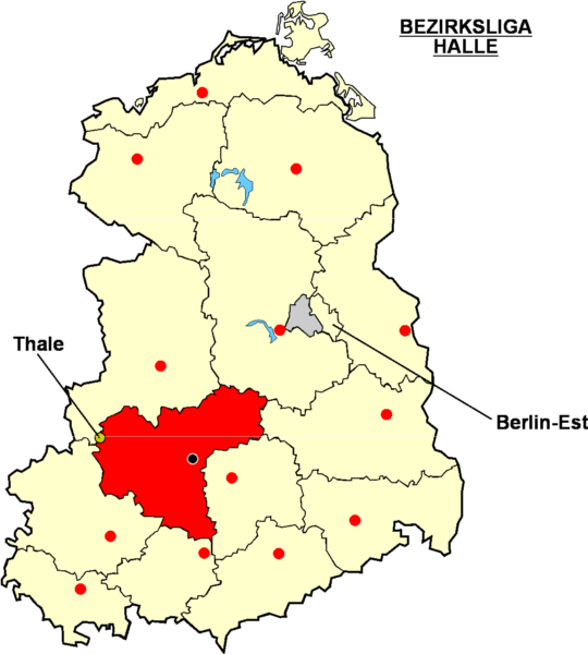 Localisation de Thale dans la "Bezirksliga Halle" Catégorie:Logo de clubs de football - Allemagne